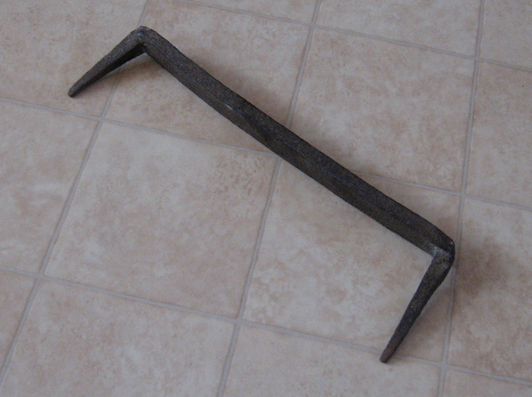 Bauklammer Česky: Kramle